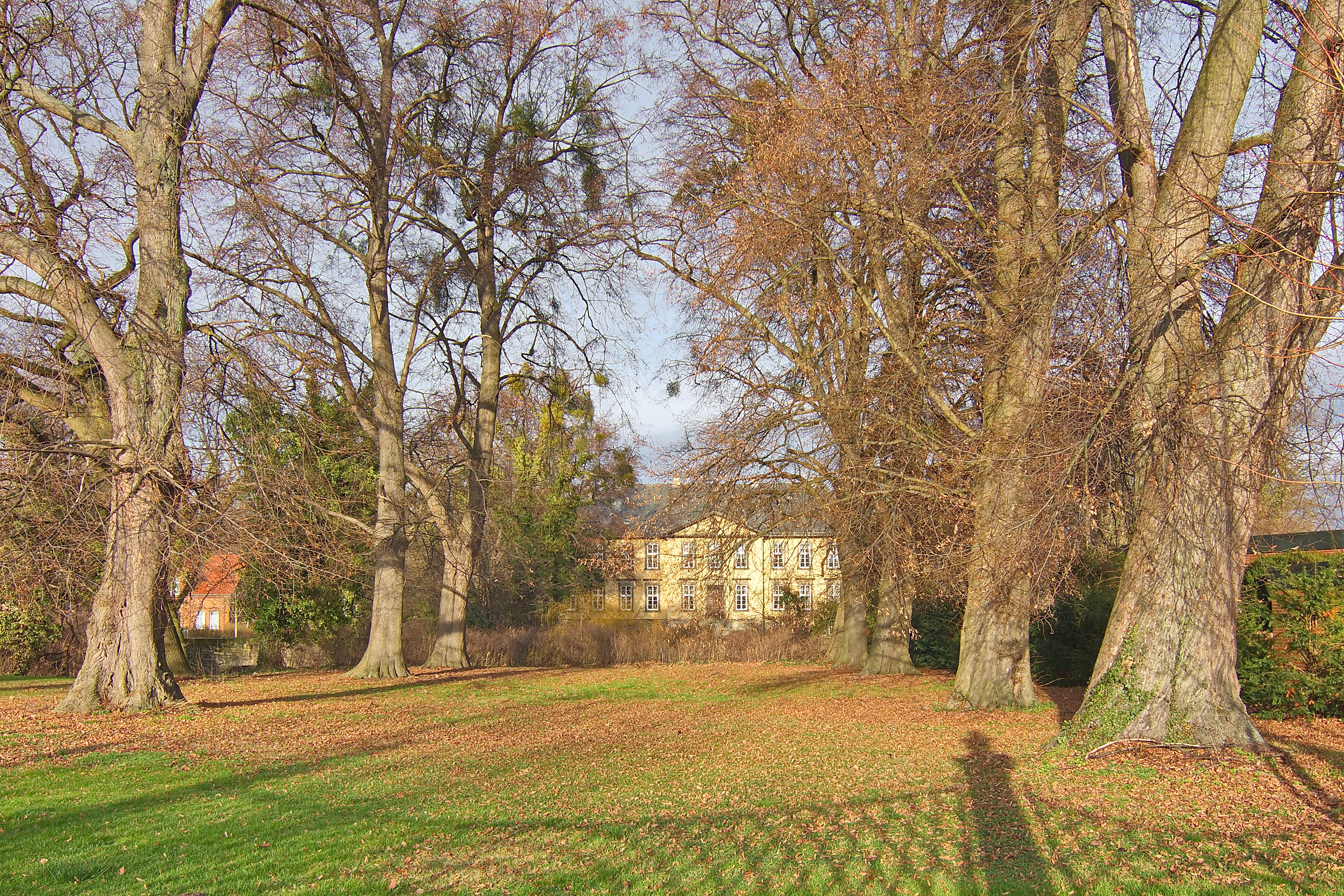 Auf dem Gutshof der Freiherren Knigge in Leveste steht das Herrenhaus, erbaut von 1728 bis 1732. Es ist von altem Baumbestand umgeben. Der Entwurf des Tores zur einst geplanten Zufahrt soll vom königlich hannoverschen Baumeister Georg Ludwig Friedrich Laves gemacht worden sein.